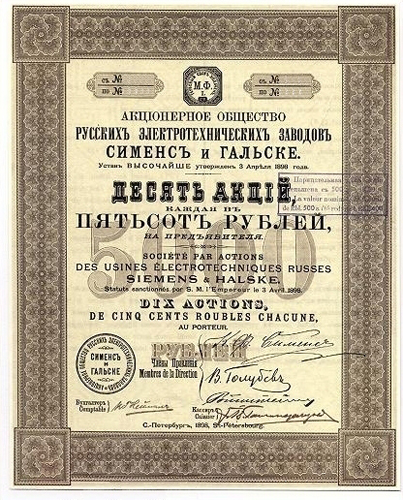 10 акций общества "Сименс-Гальске"